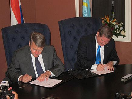 Minister Piet Hein Donner van Binnenlandse Zaken en Koninkrijksrelaties en Minister-President Mike Eman van Aruba ondertekenen een samenwerkingsprotocol tussen Nederland en Aruba.